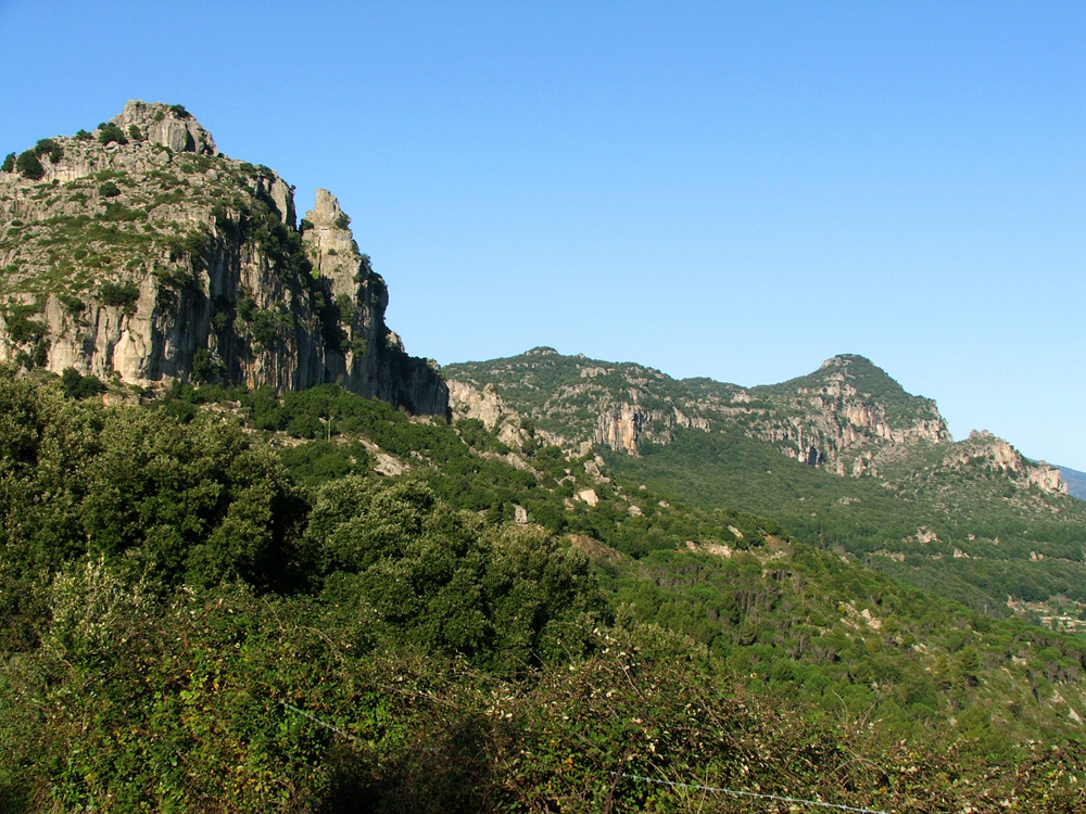 Tacchi